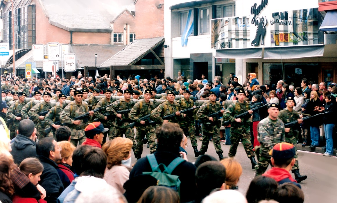 Desfile del 9 de julio (día de la Independencia) de 2004, en Junín, Argentina / July 9th (Independence Day) 2004 parade in Junín, Argentina.